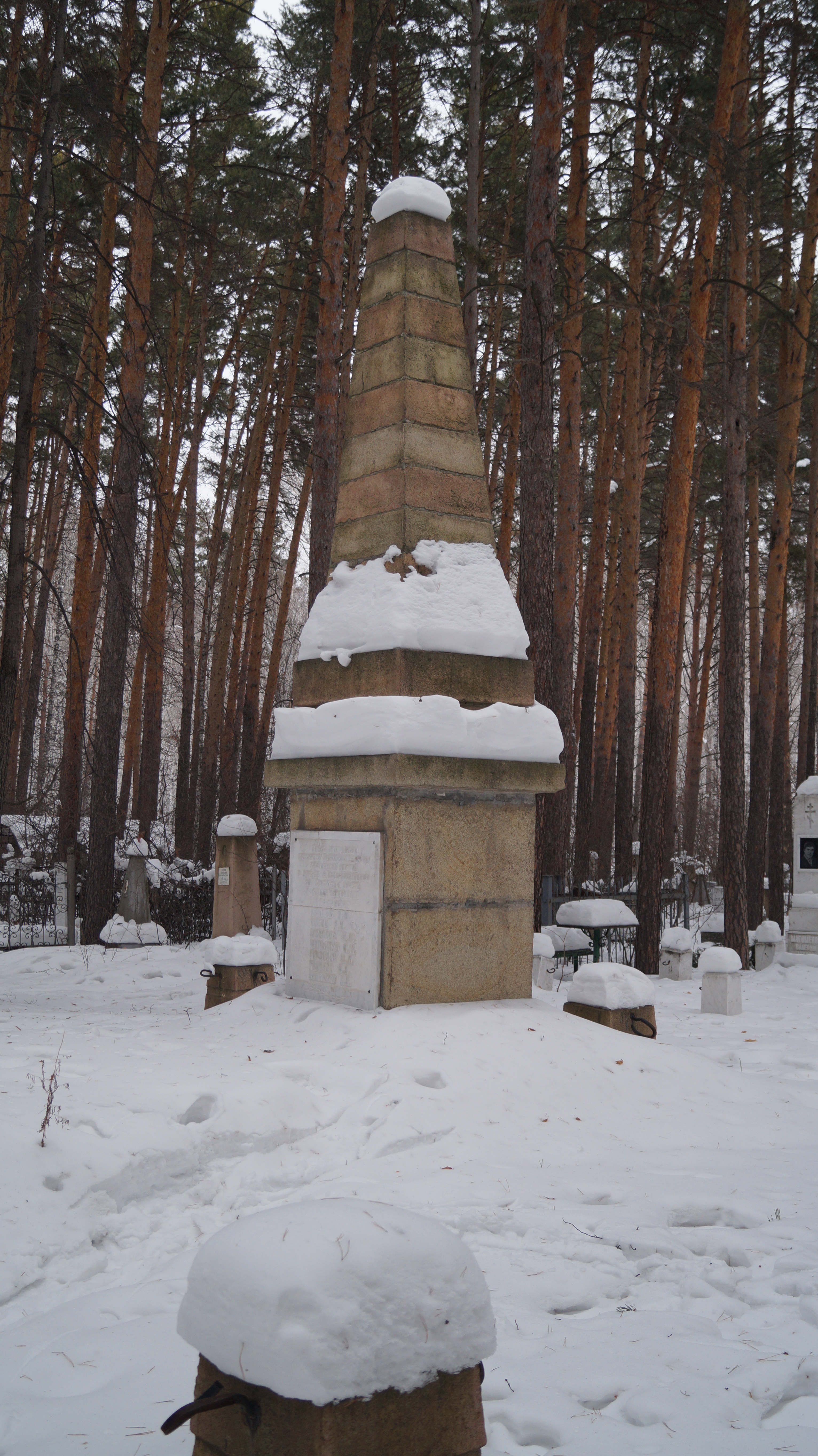 Памятник лётчикам, погибшим в Челябинске в 1919 году при освобождении города от армии Колчака (1927 год)